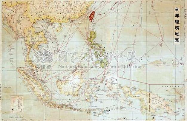 中文（台灣）: 原件由國立臺灣歷史博物館典藏